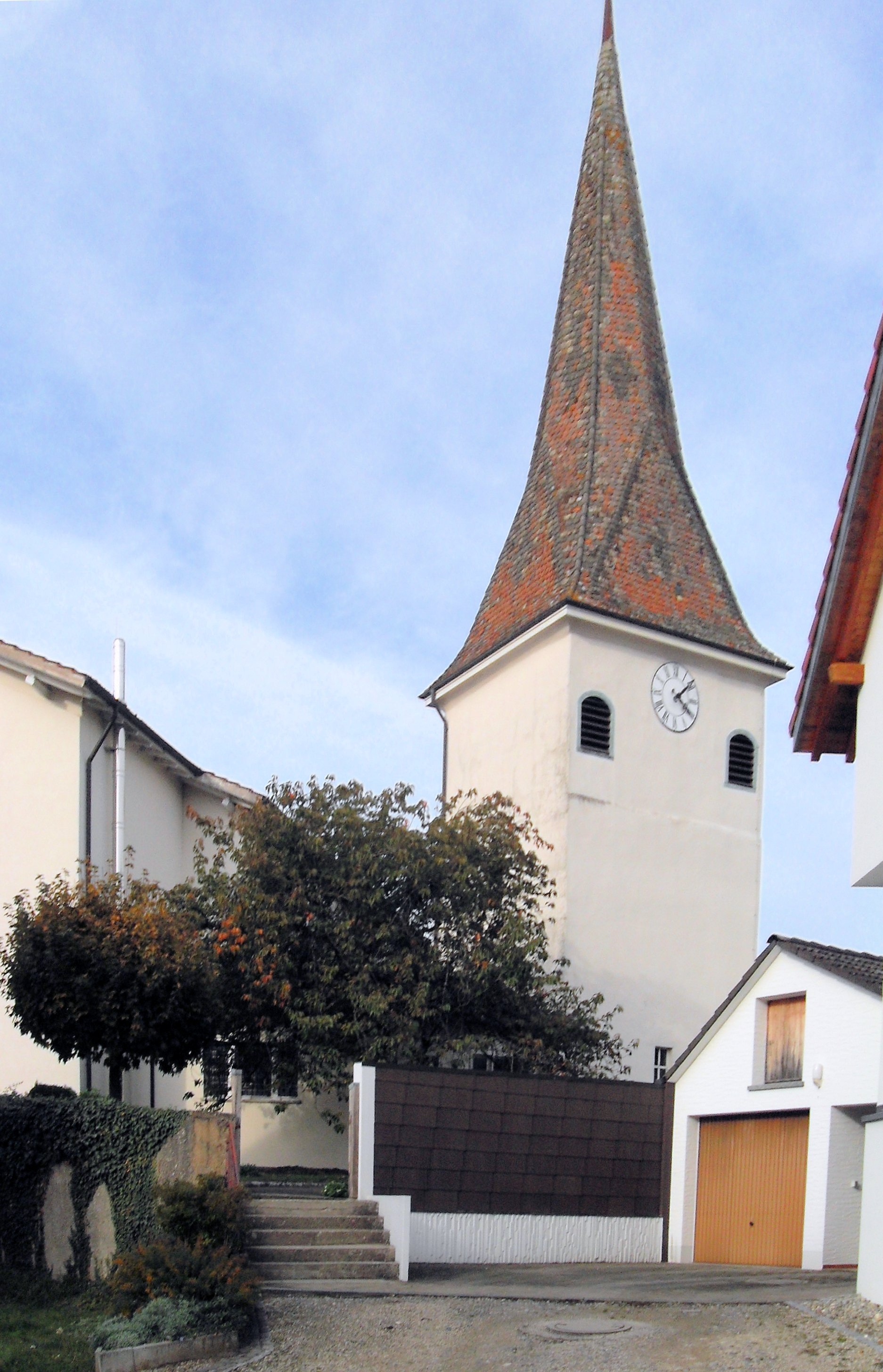 Pfarrkirche_St._Gallus in Bietingen, Gemeinde Gottmadingen, Deutschland